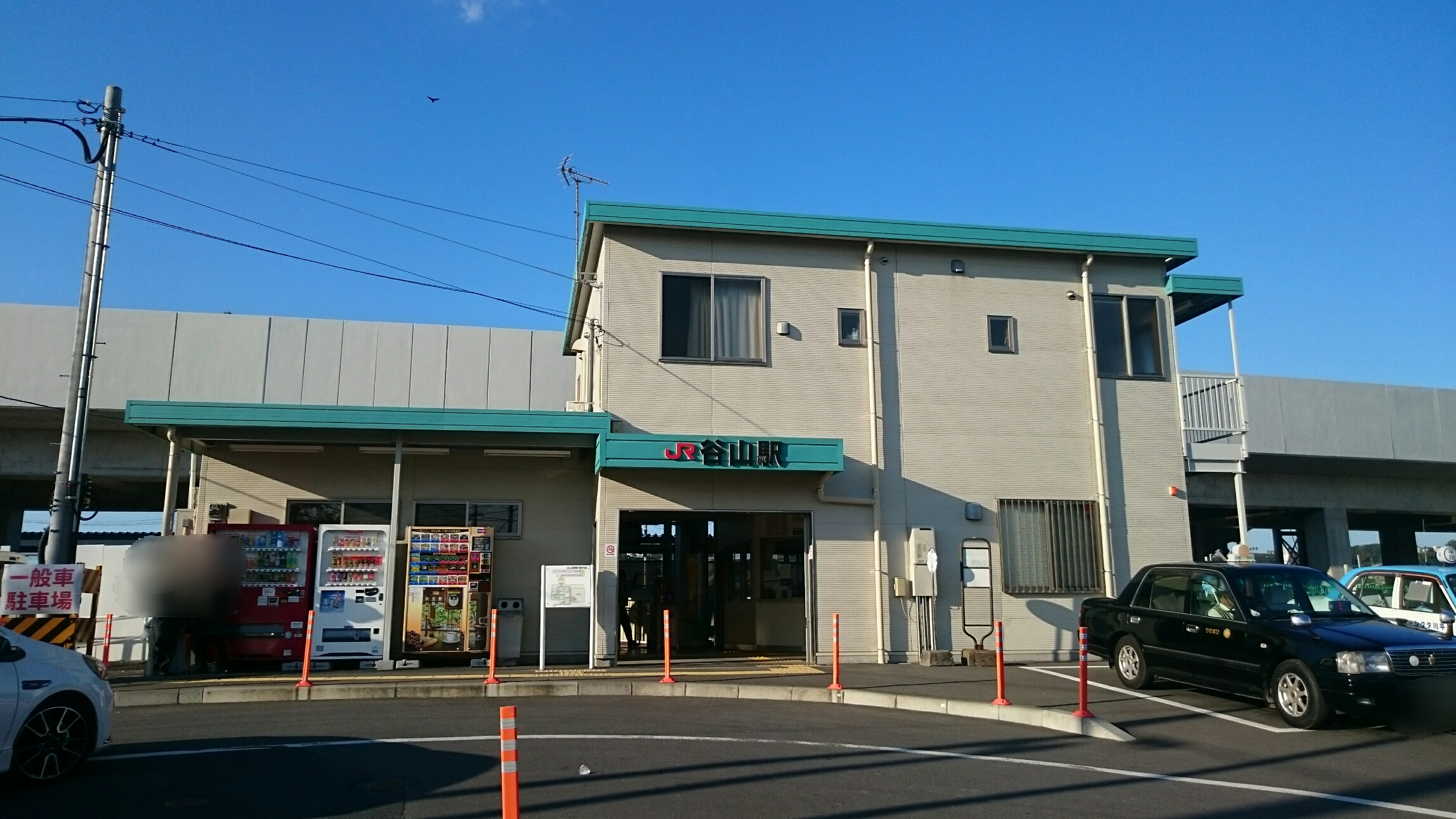 JR谷山駅・駅舎出入口（仮駅舎）